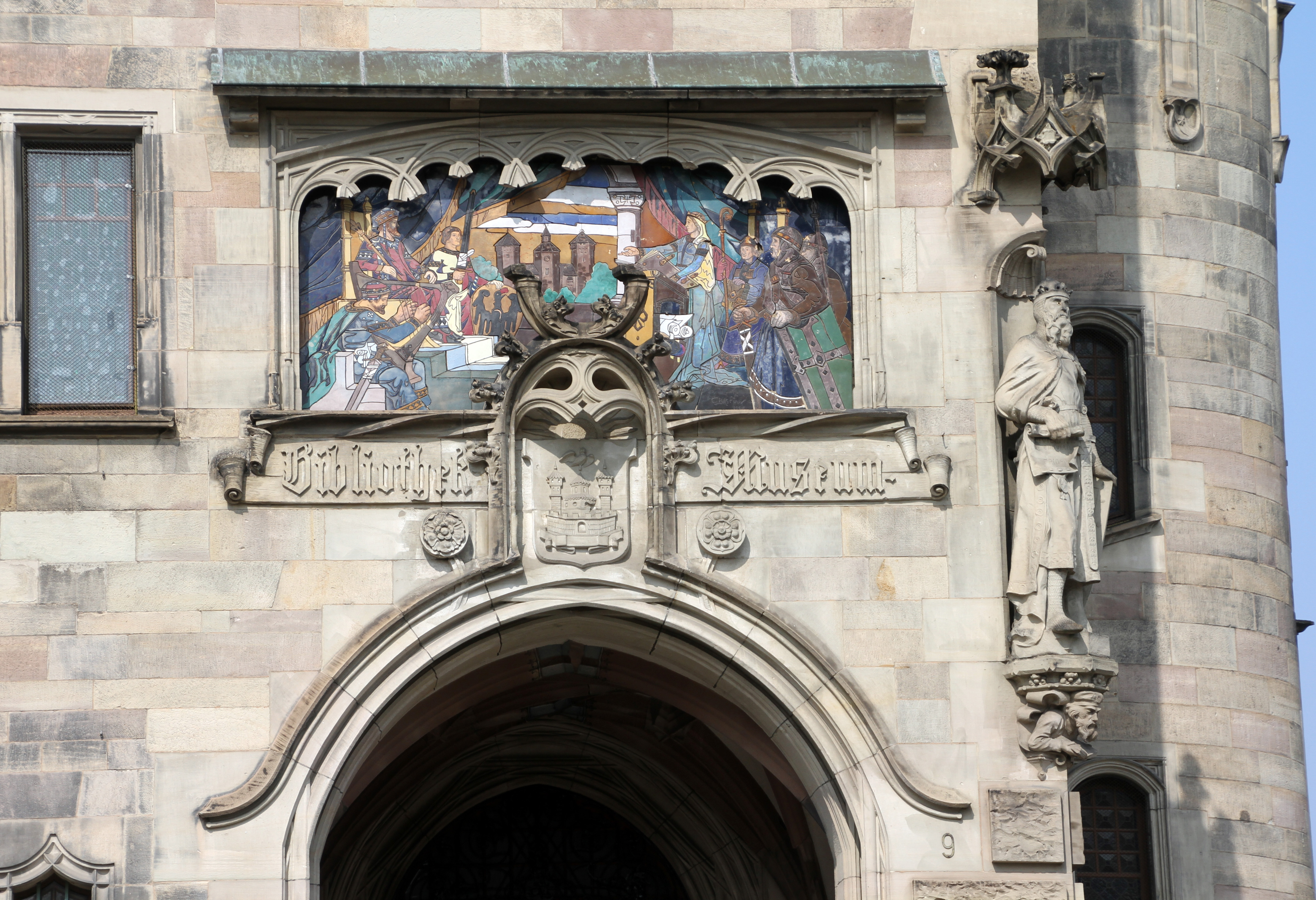 Historisches Museum